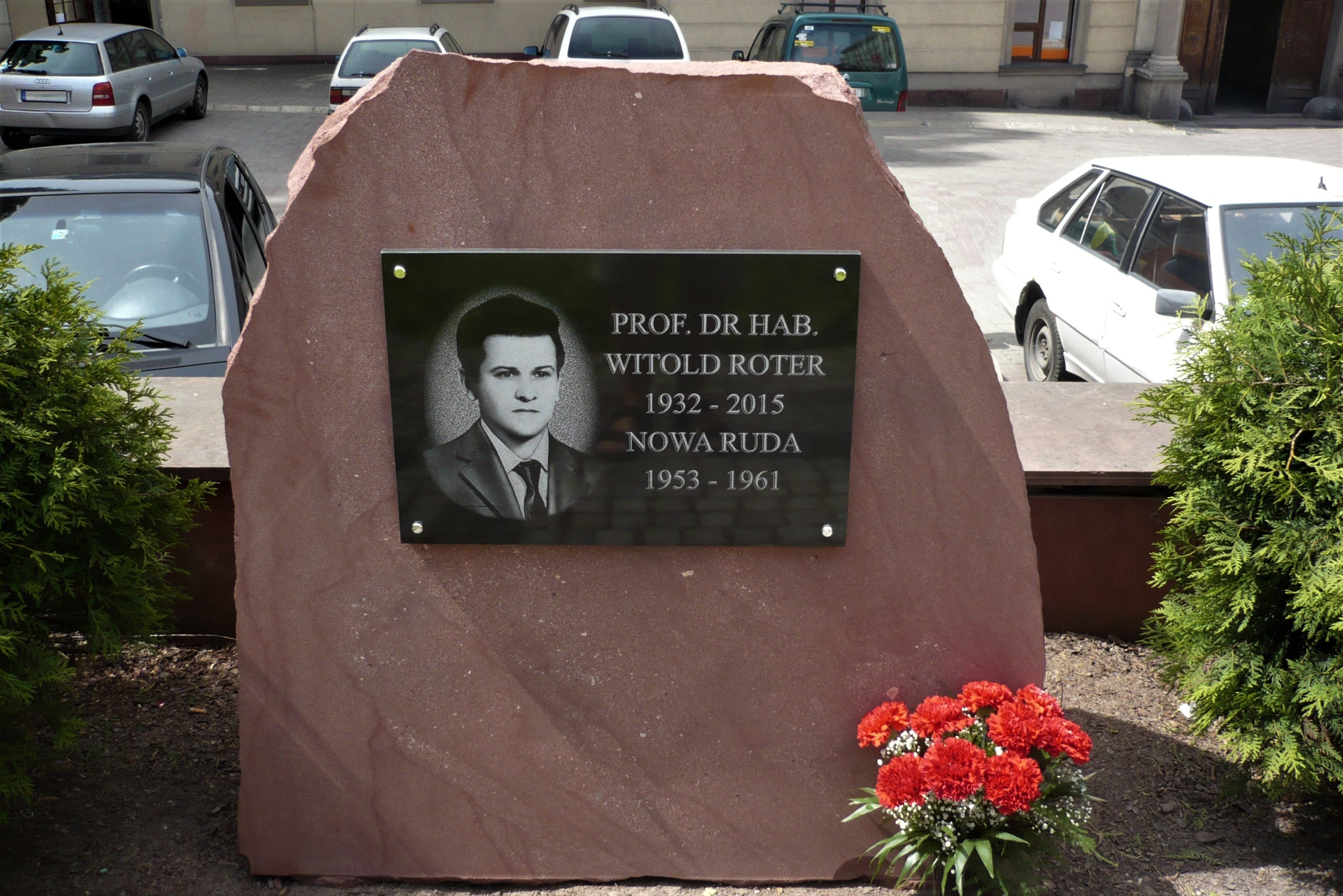 Witold Roter (1932-2015). Obelisk w Nowej Rudzie